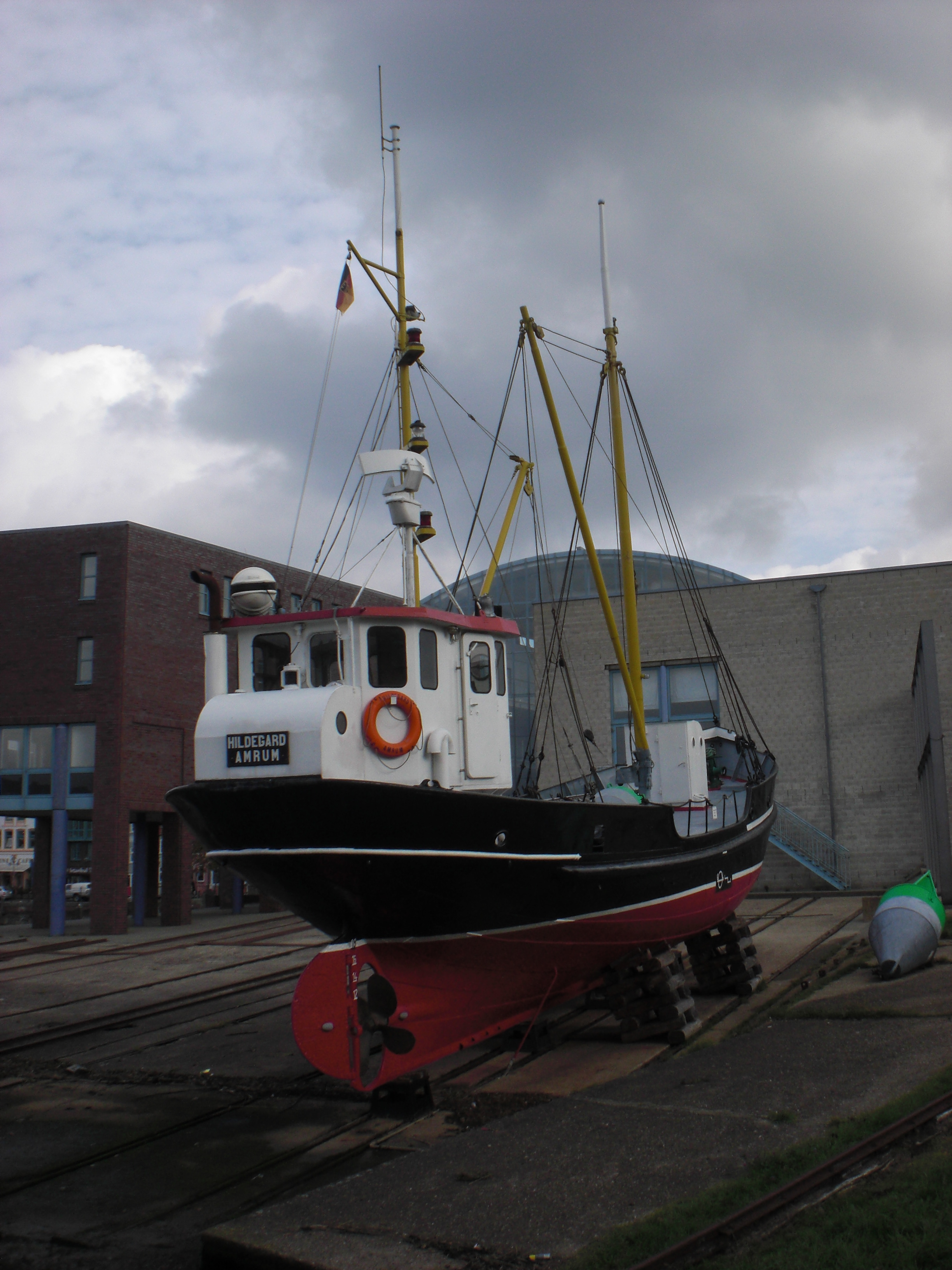 Der ehemalige Vertragstonnenleger HILDEGARD der Familie Ricklefs/Amrum auf dem Slip der ehemaligen Husumer Schiffswerft. Sie wurde für die Kleinbetonnung in den Wattfahrwassern eingesetzt. Baujahr: 1907 Bauwerft: Stocks und Kolbe in Kiel Baukosten: 39000 m Länge:22,29 m Breite: 5,01 m Tiefgang: 2,55m Seitenhöhe: 2,55m Besatzung: 3 Mann Leistung:90PS/ ab 1979 290 PS Geschwindigkeit: 8 / 12 Kn Heimathafen: Amrum Dienstzeit: 1907- 1983 Seit 1907 als Segler "EIDER" in Fahrt 1921 Umrüstung zum Motorschiff 1958 verkauft an Vertragstonnenleger Ricklefs/ Amrum . Umbenennung in "HILDEGARD" 1978 Außerdienststellung und kauf als Museumsschiff durch das Schiffahrtsmuseum Nordfriesland 2000 Verholung auf die ehemalige Slipanlage der Husumer Werft.